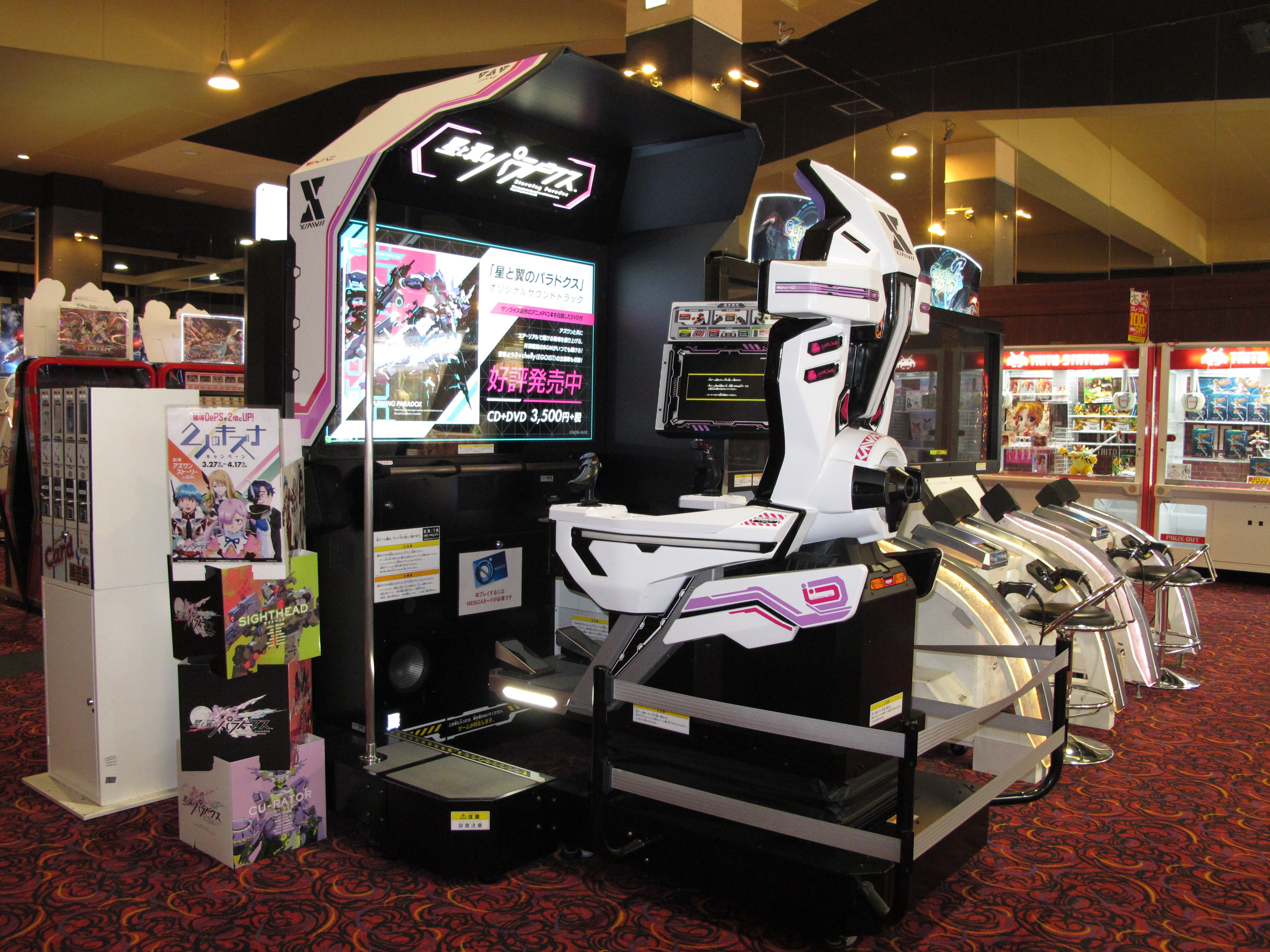 「星と翼のパラドクス」のアーケードゲーム筐体。タイトーステーション・イオンタウン水戸南店にて。 Canon PowerShot G11